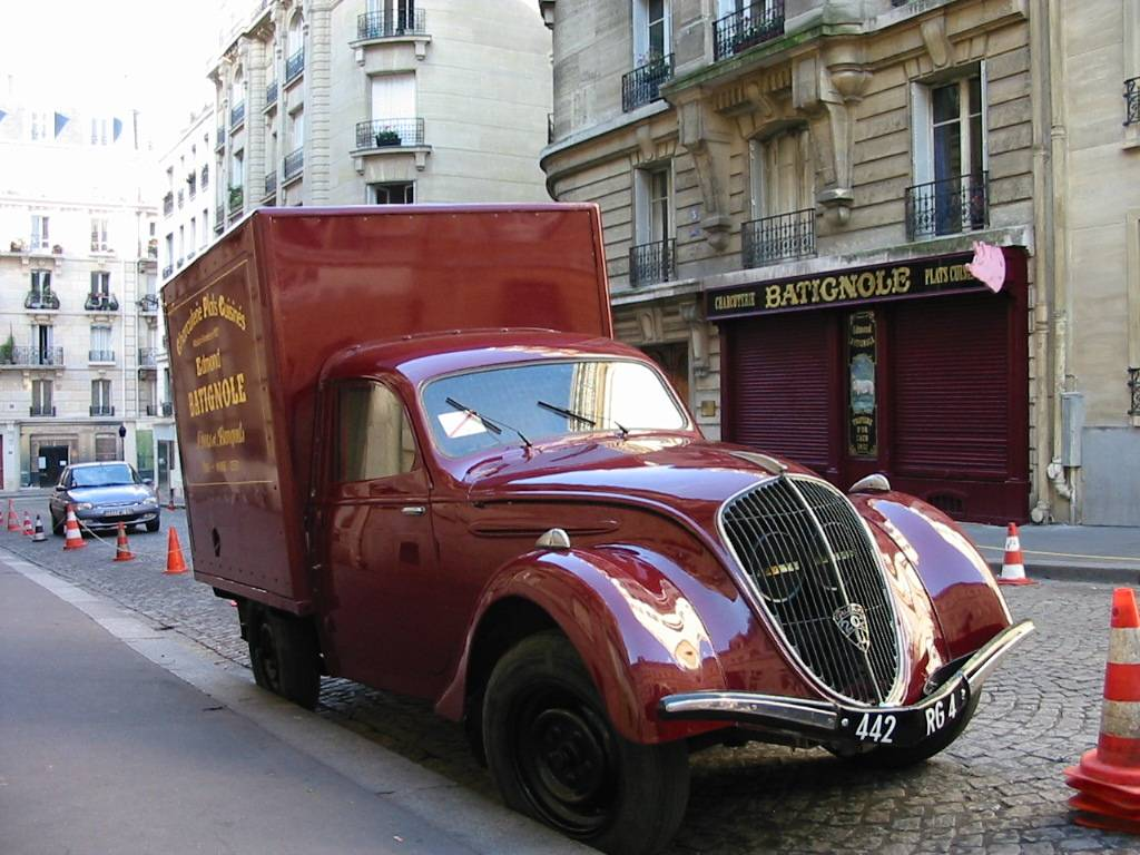 Tournage du film Monsieur Batignole, Rue Sivel, Paris 14ème.